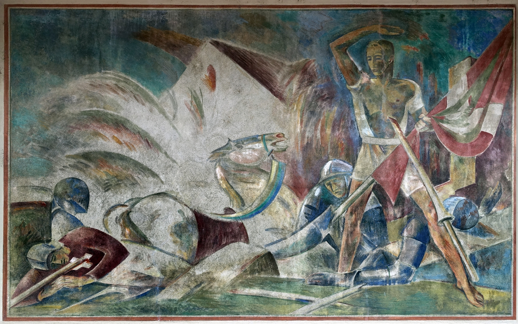 Wandbild, 1917, Steinwurf des Arnold Schick in der Schlacht bei St. Jakob an der Birs 1444. Von Alfred Heinrich Pellegrini (1881–1958) an der Fassade der St. Jakob Kirche, Basel.